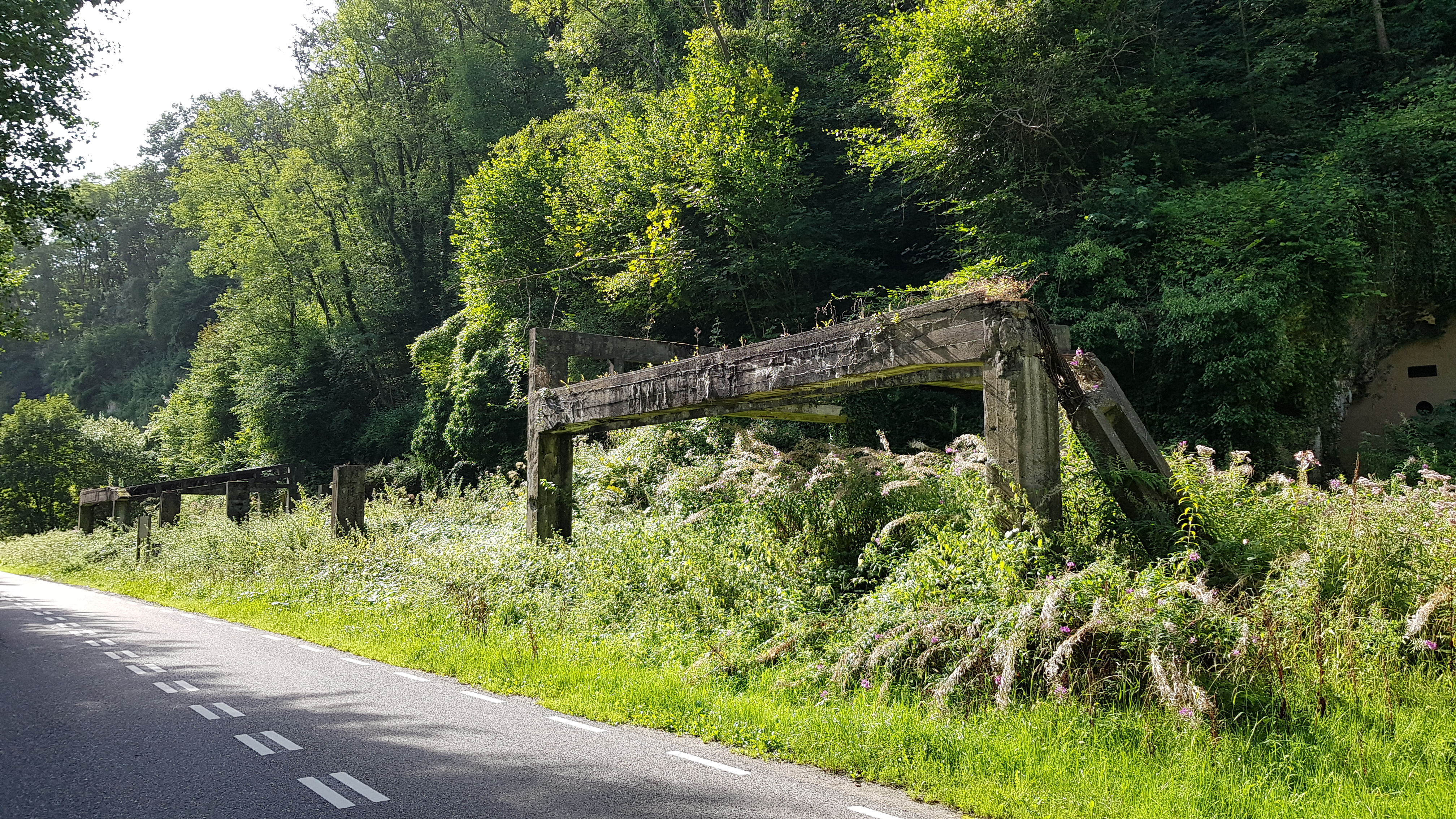 betonnen laadperron, Bronsdaelgroeve, Geulhem, Nederland